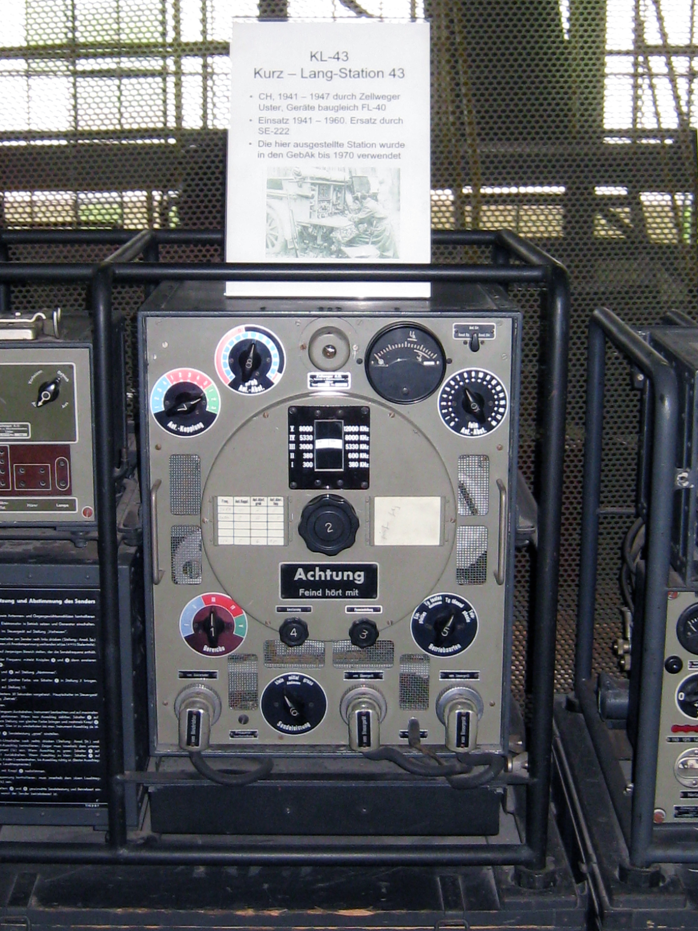 Funkstation KL-43 der Schweizer Armee im Militärmuseum Full